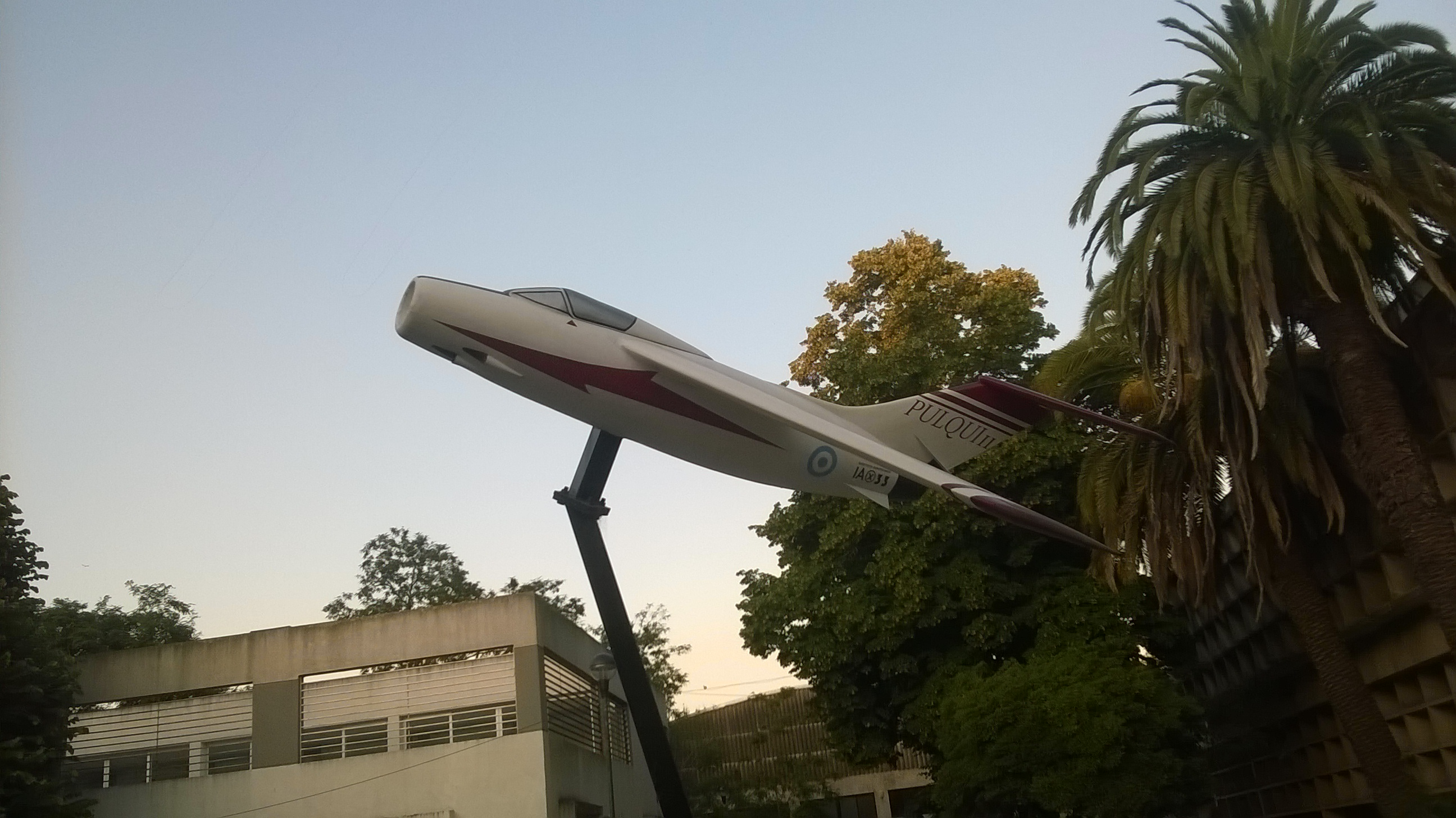 Maqueta del Pulqui II en el sector de aeronáutica en la Facultad de Ingeniería (UNLP)